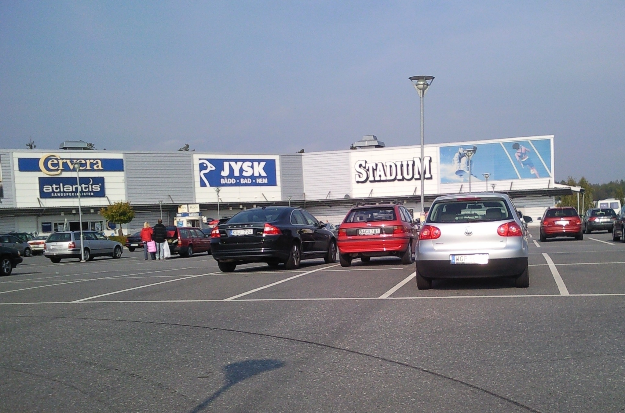 Länna handelsplats